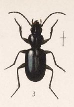 Trechus coarctatus = Mexitrechus coarctatus (Bates, 1881)